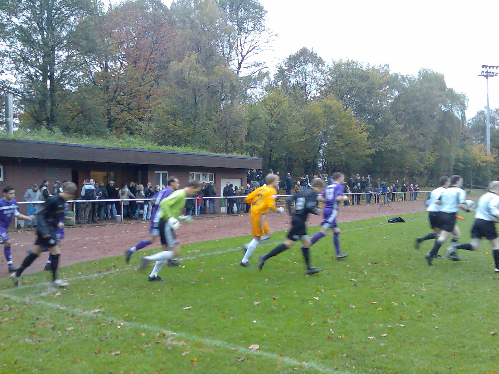 Sportplatz Sternschanze mit Umkleidehaus